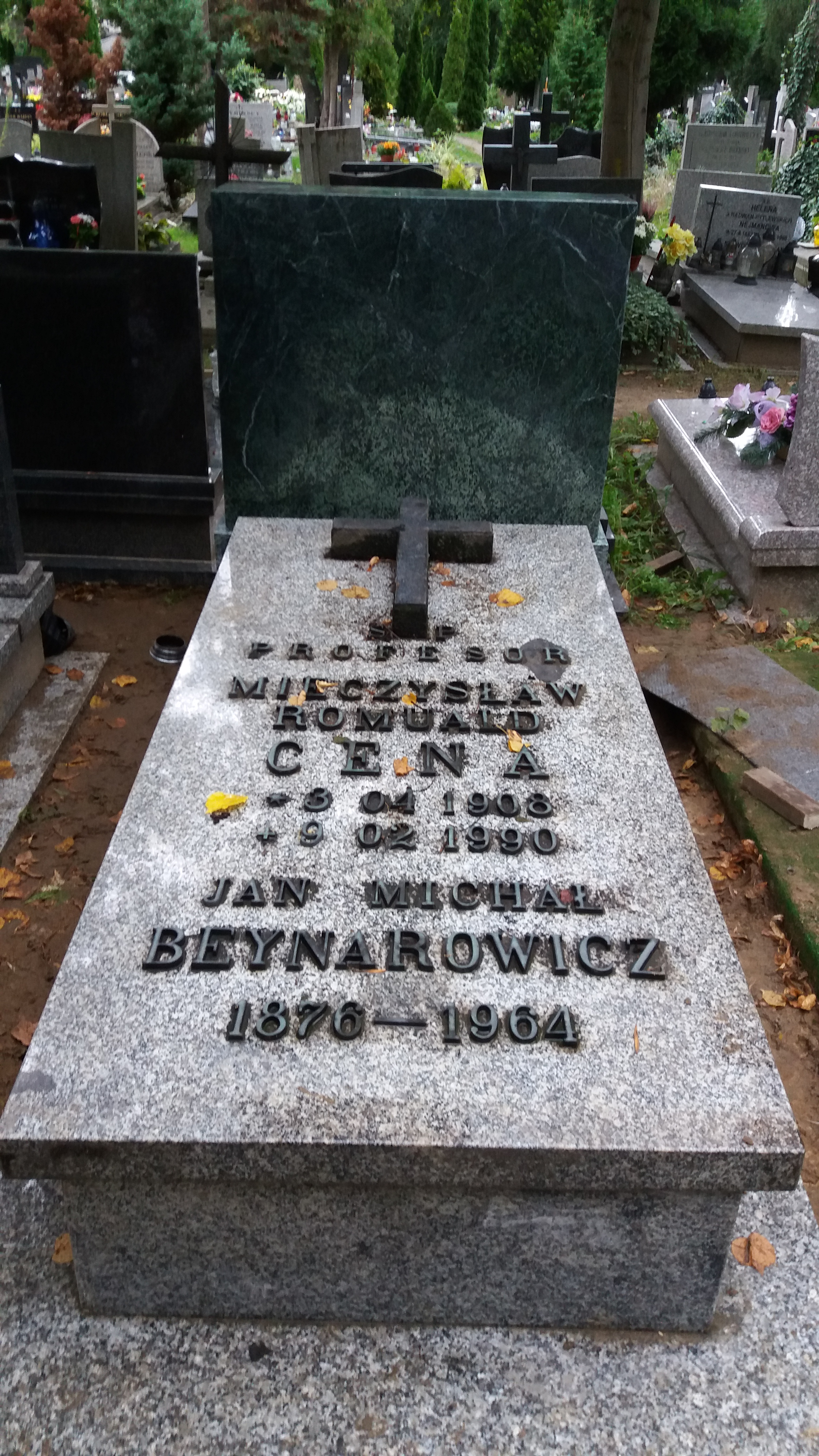 Mieczysław Cena i Jan Michał Beynarowicz, wspólny grobowiec na Cmentarzu św. Wawrzyńca we Wrocławiu